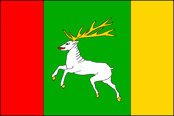 vlajka, Lhota ,okres Přerov